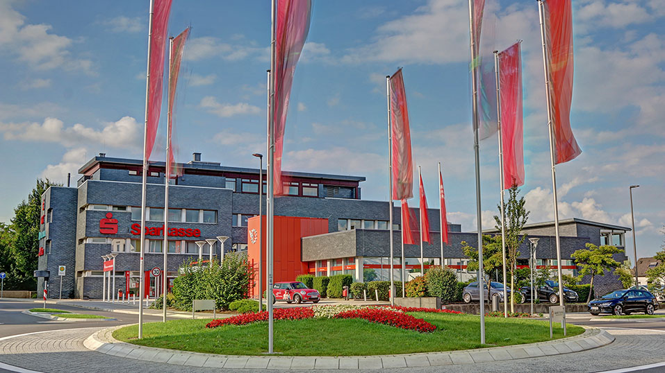 Hauptstellengebäude der Sparkasse Radevormwald-Hückeswagen mit davor liegendem Kreisverkehr.